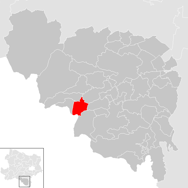 Bezirk Neunkirchen